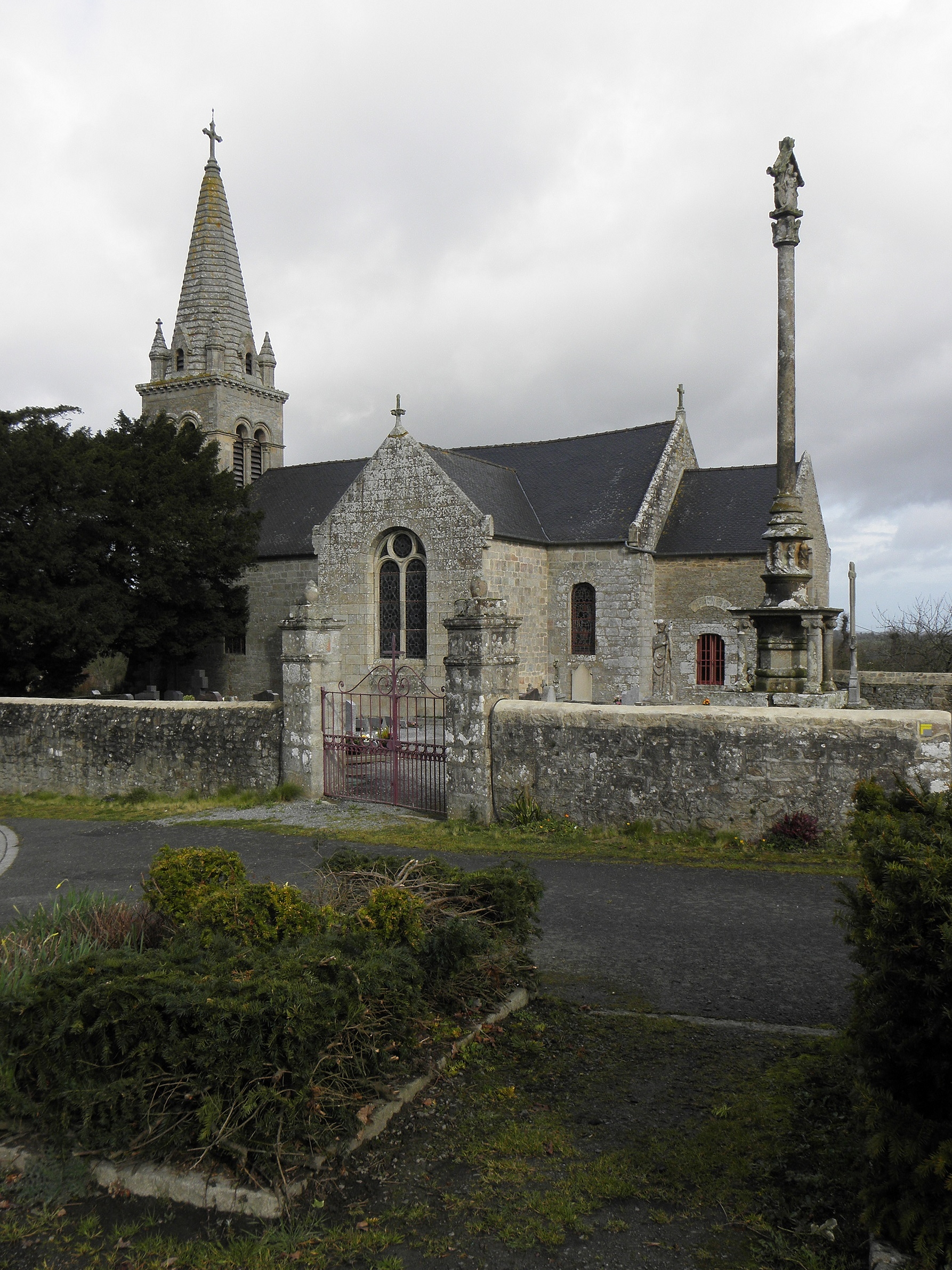 Église saint-Maudez, commune de saint-Maudez (22). Vue méridionale, avec les deux croix inscrites monuments historiques.